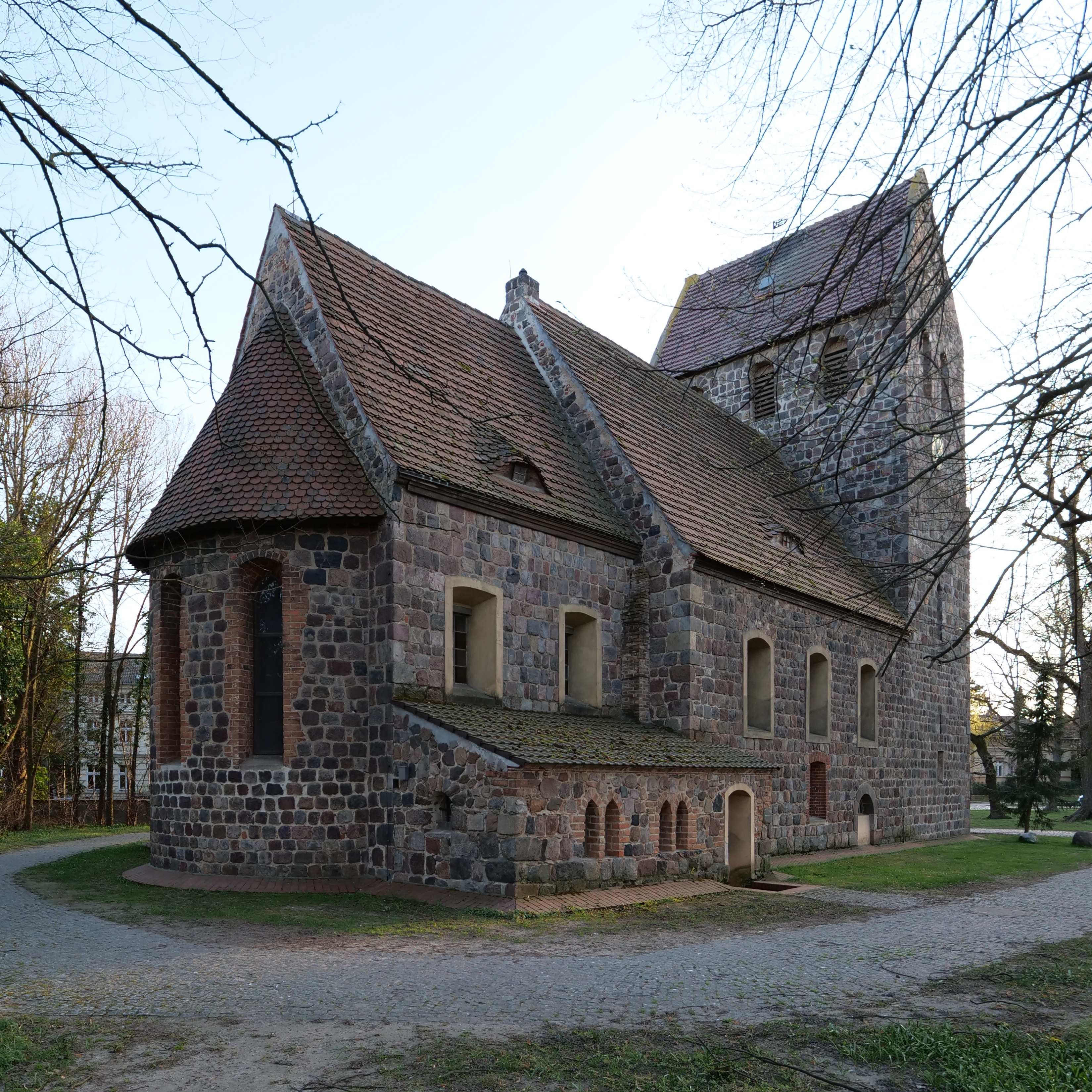 Dorfkirche Marienfelde